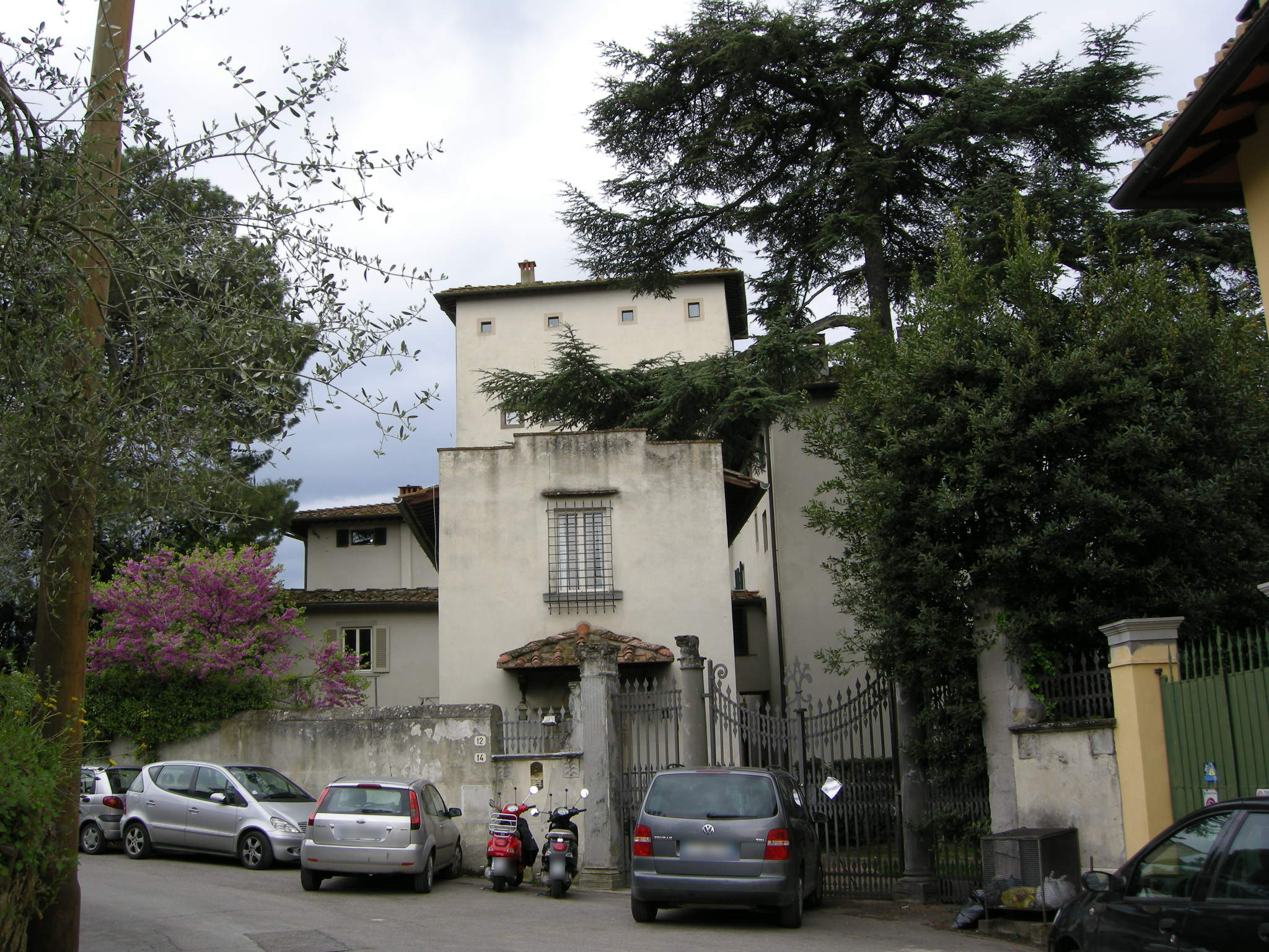 Villa di monteripaldi